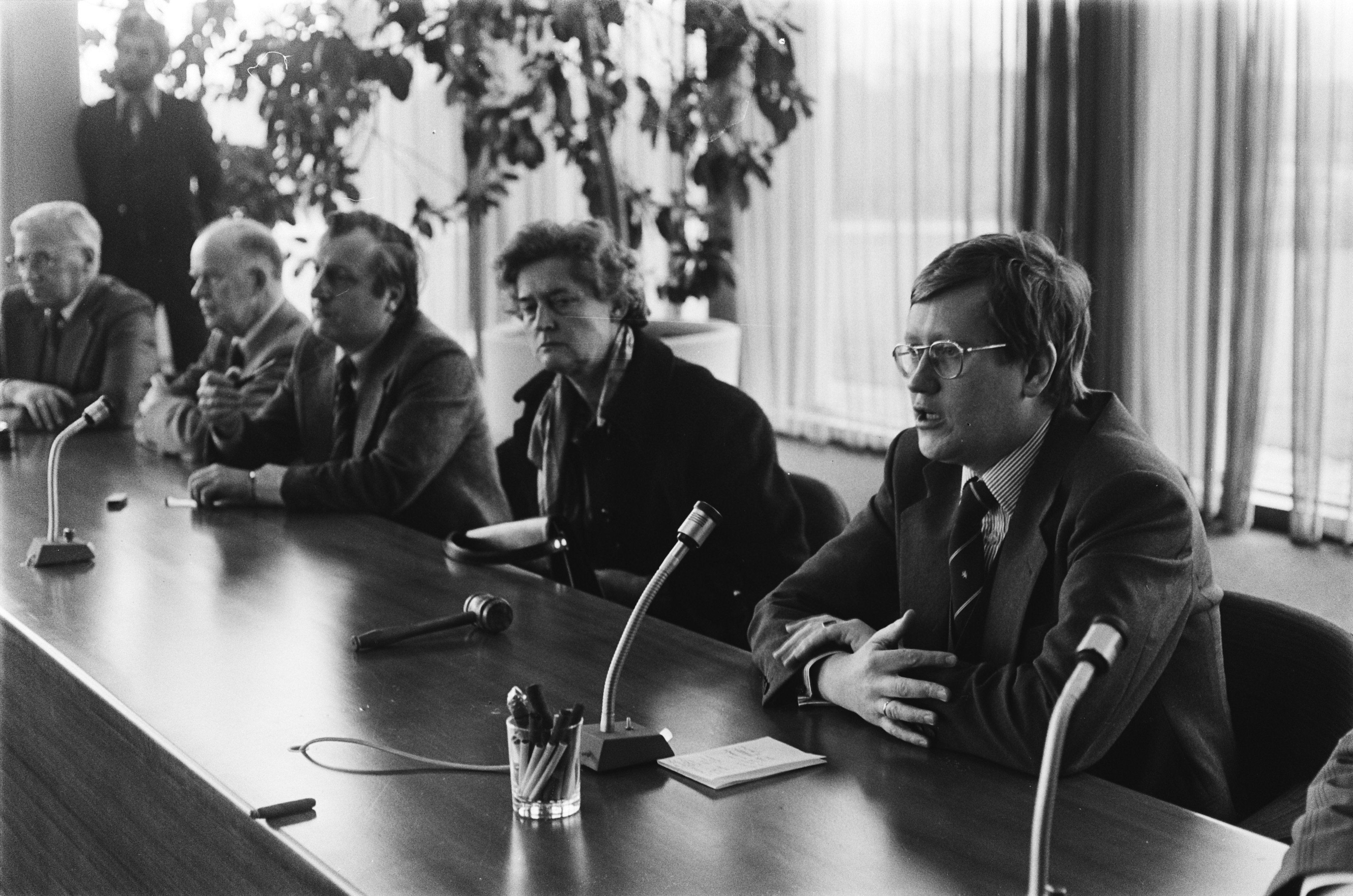 Assen, dag na de beeindiging van de gijzeling in het Provinciehuis; vice-premier Wiegel geeft een persconferentie. Links van hem de commissaris van de Koningin in Drenthe mw. mr. A.P. Schilthuis